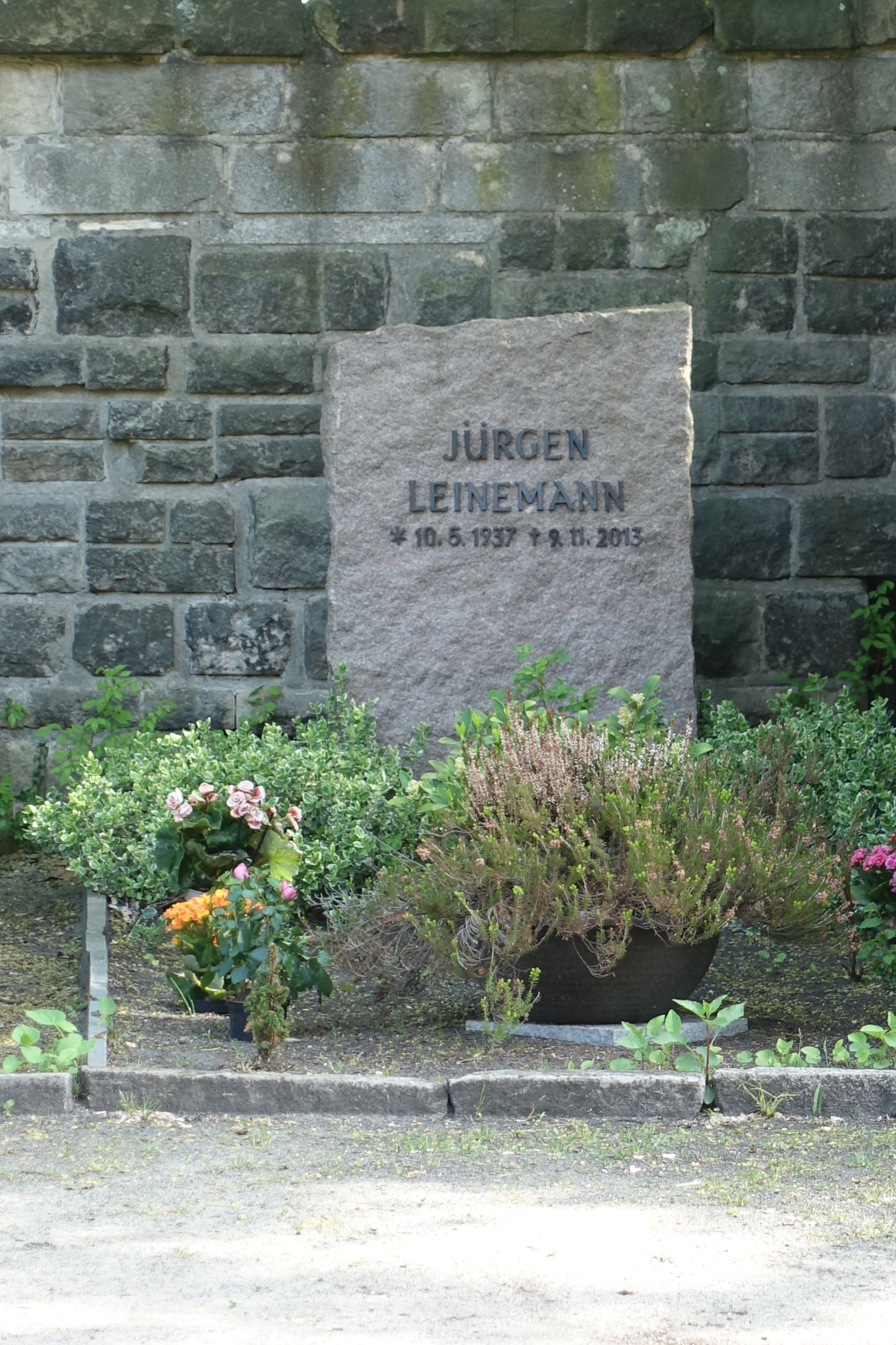 Grab von Jürgen Leinemann